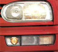 Volkswagen Golf Lamp